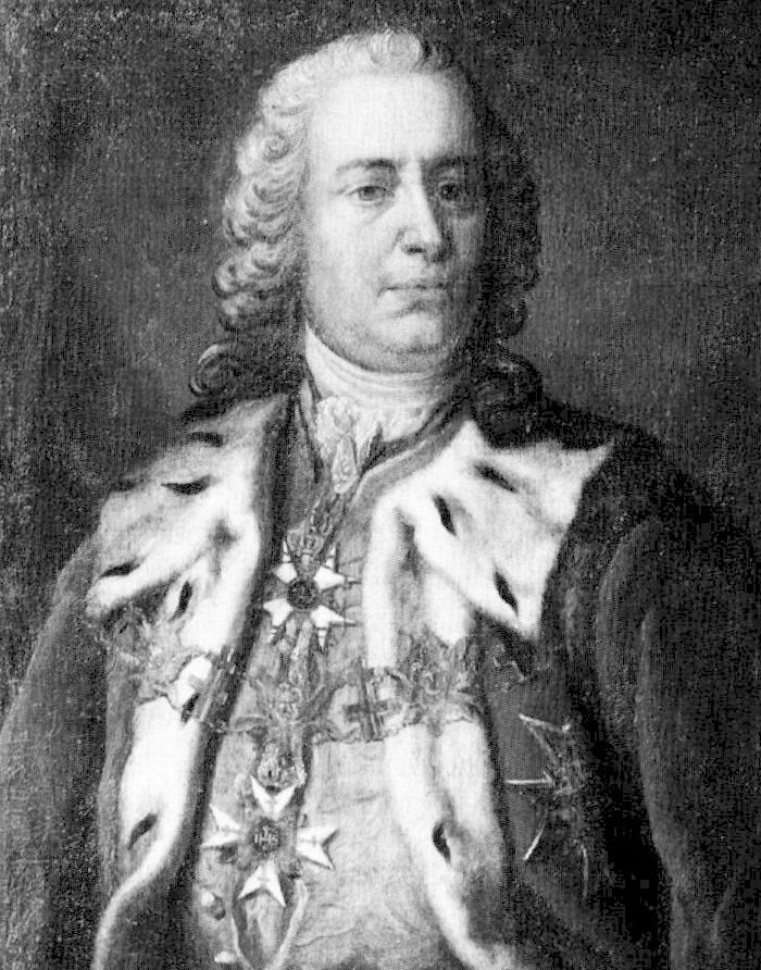 Carl Johan Stiernstedt, riksråd och landshövding